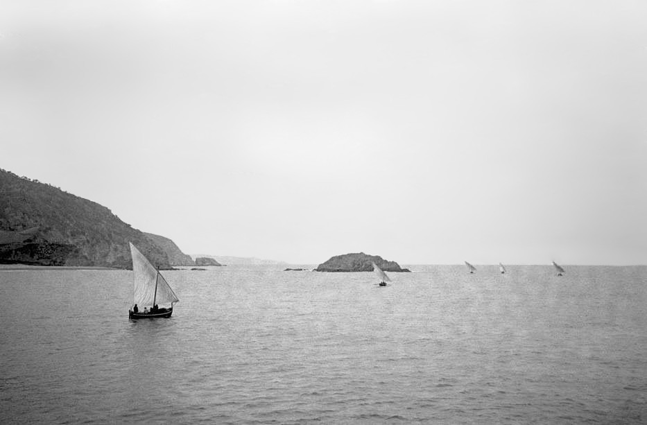 Imatge